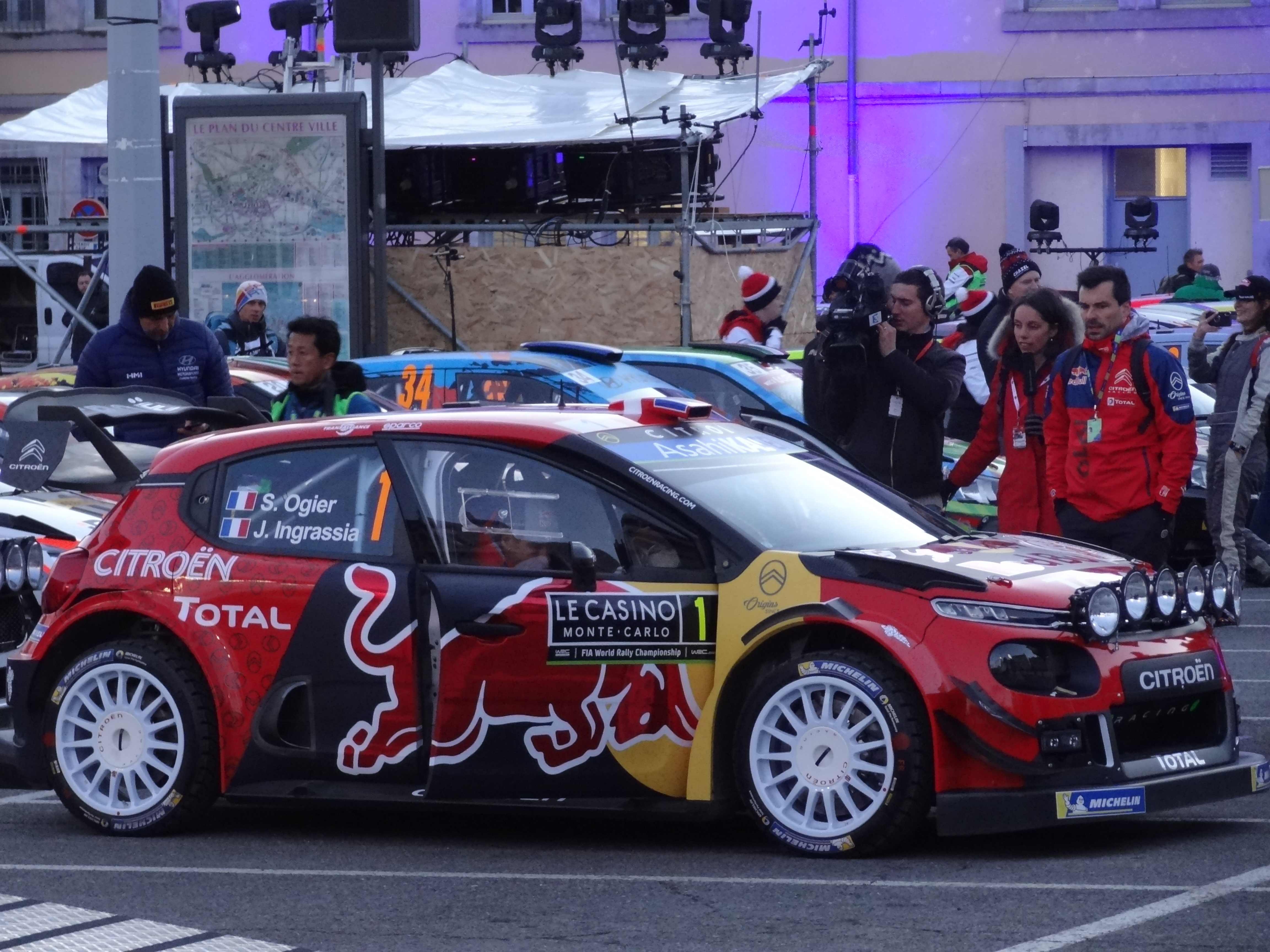 Citroën C3 WRC de Sébastien Ogier au Rallye Monte-Carlo 2019.